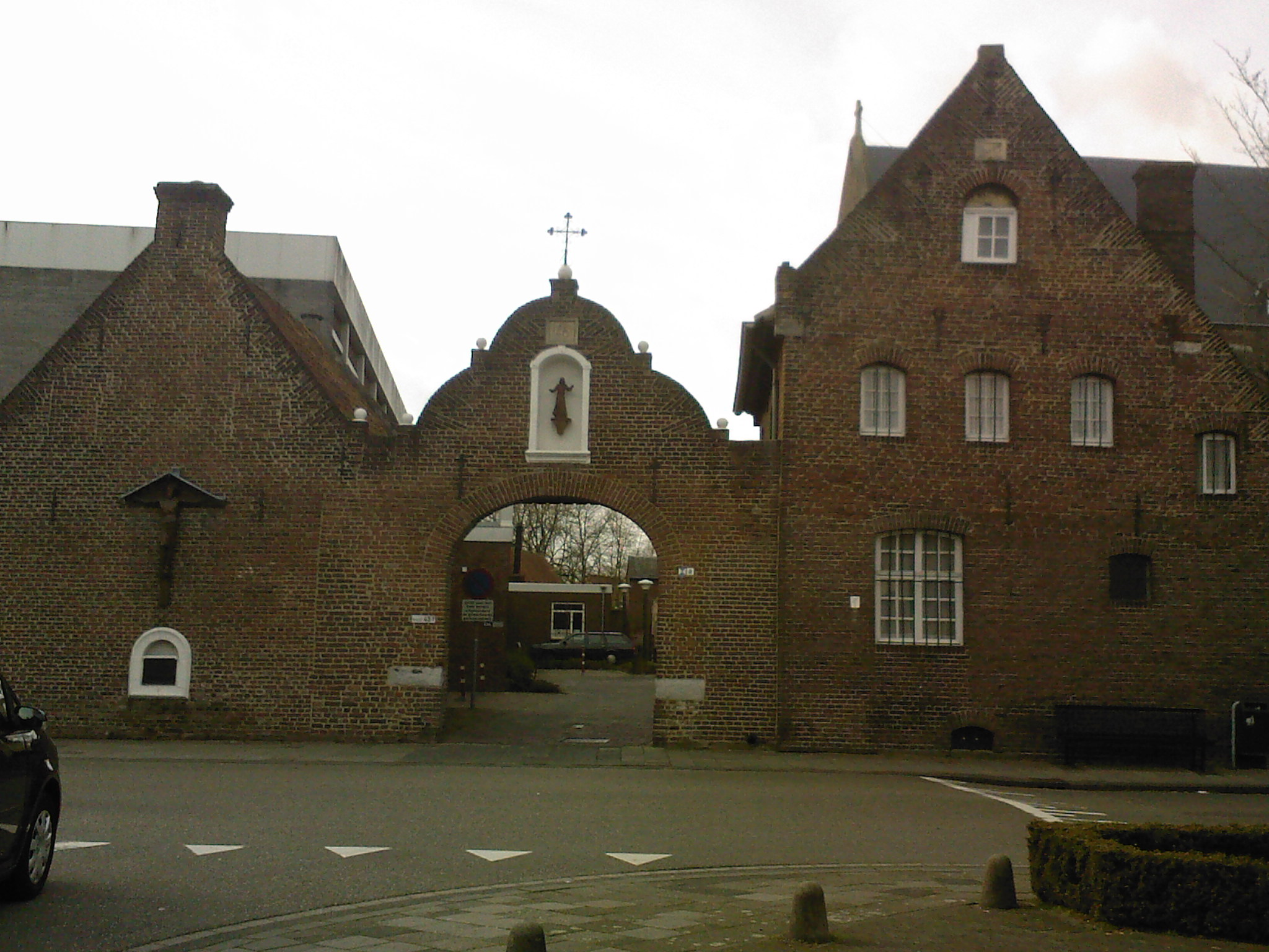 ingang klooster Biest